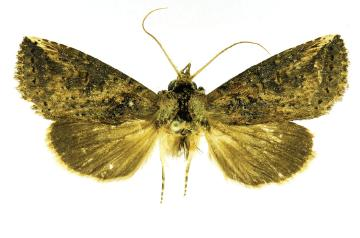 Elasmia mandela (2d) adults.